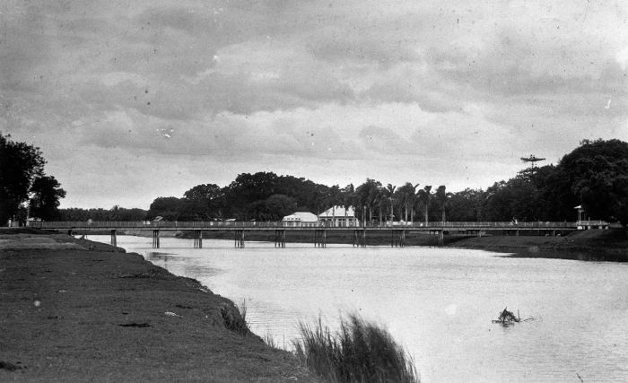 Foto. Brug over de Atjeh rivier .